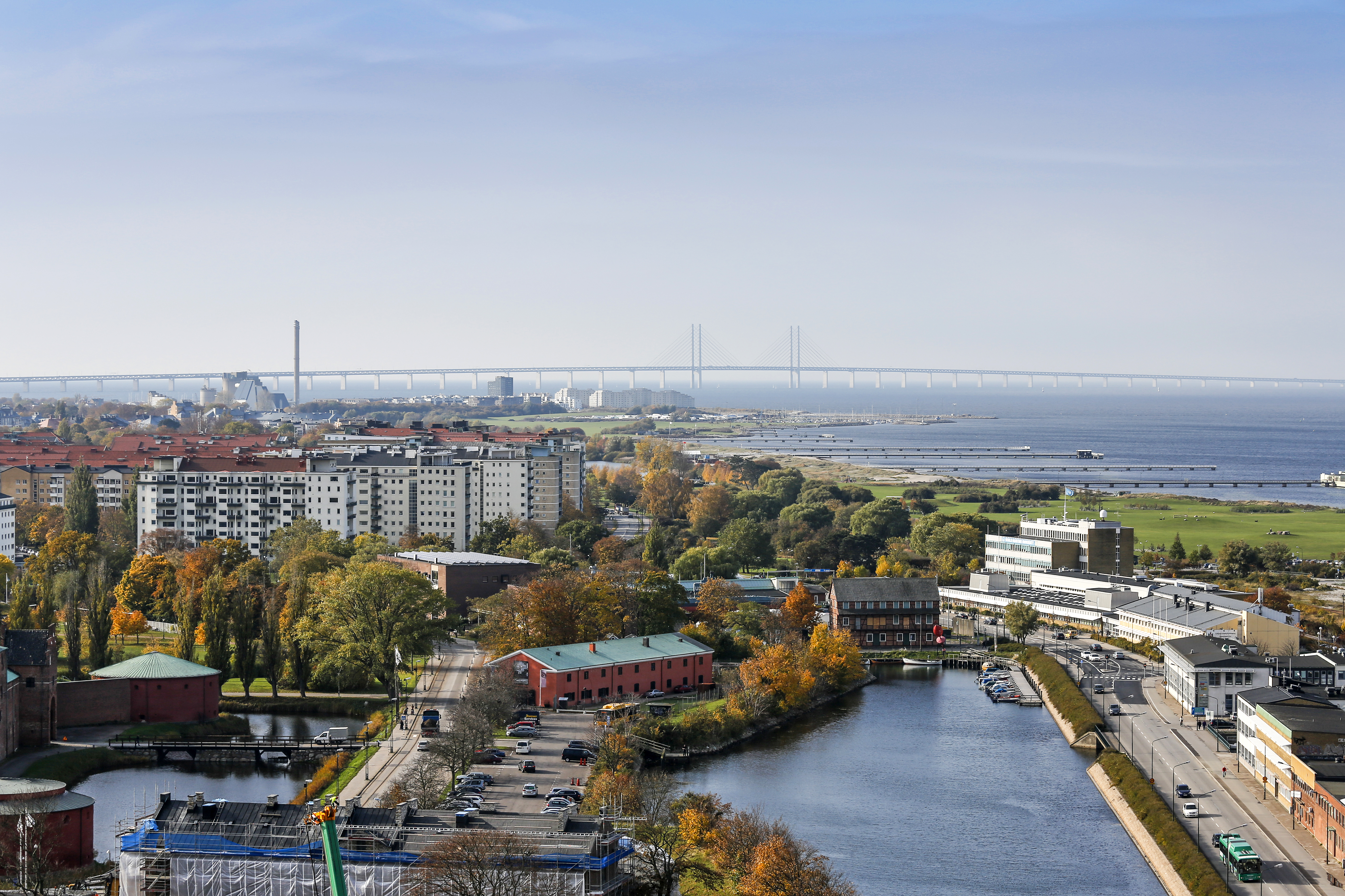 Utsikt från Malmö Live mot Slottsstaden, Ribergsborg, Ribershus och längst bak Ön i Limhamn och Öresundsbron. Photo: News Øresund - Thea Wiborg © News Øresund(CC BY 3.0) Detta verk av News Øresund är licensierat under en Creative Commons Erkännande 3.0 Unported-licens (CC BY 3.0). Bilden får fritt publiceras under förutsättning att källa anges. The picture can be used freely under the prerequisite that the source is given. News Øresund, Malmö, Sweden. Øresund är en oberoende regional nyhetsbyrå som ingår i projektet Øresund Media Platform som drivs av Øresundsinstituttet i partnerskap med Lunds universitet och Roskilde Universitet och med delfinansiering från EU (Interreg IV A Öresund) och 14 regionala; icke kommersiella aktörer.